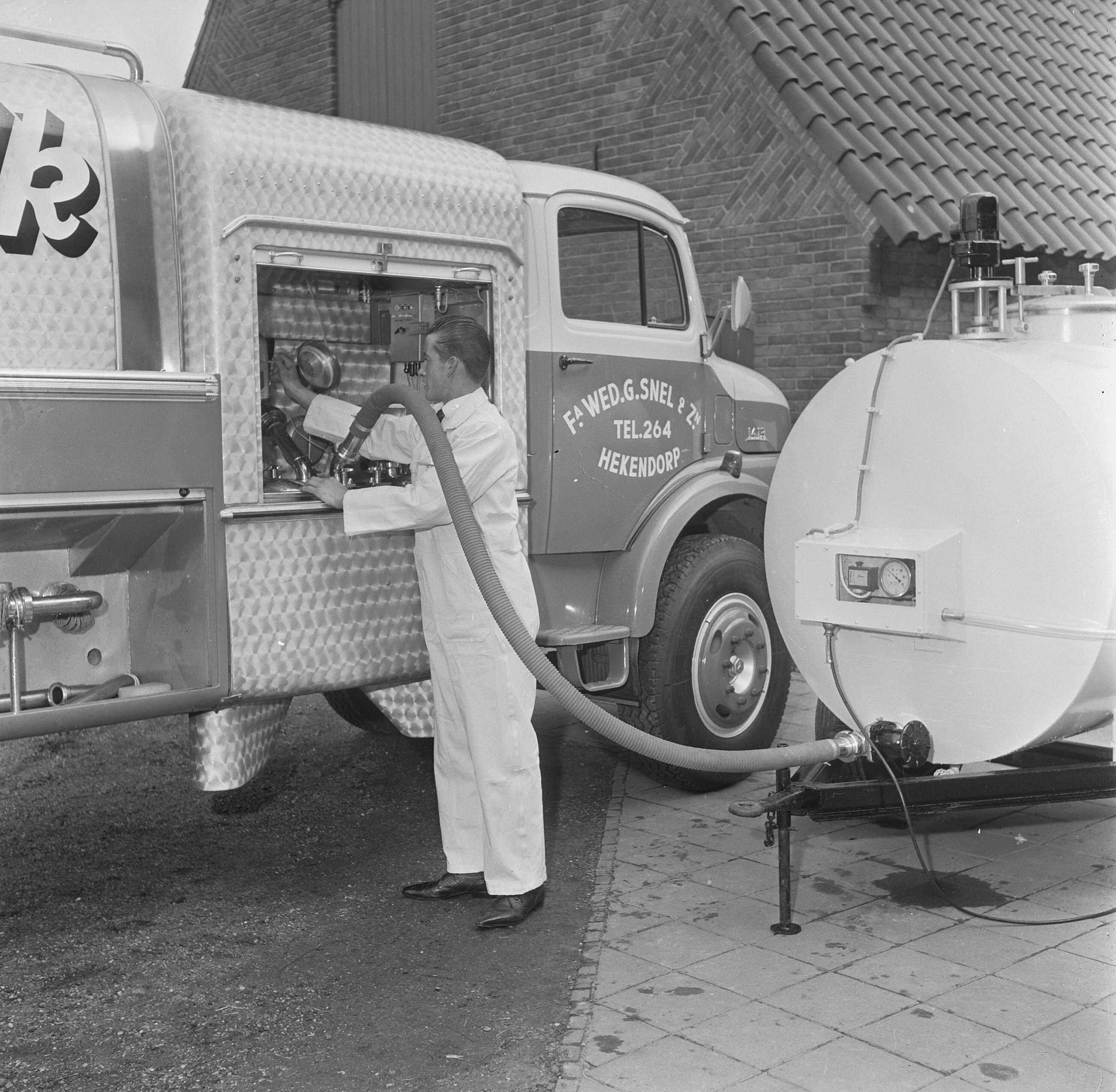 Collectie / Archief : Fotocollectie Anefo Reportage / Serie : [ onbekend ] Beschrijving : Melkinrichting Menken NV te Wassenaar, nieuw systeem voor transport en conservering melk Datum : 7 april 1965 Locatie : Wassenaar, Zuid-Holland Trefwoorden : MELK, Transporten, conserveringen Fotograaf : Voets, Jan / Anefo Auteursrechthebbende : Nationaal Archief Materiaalsoort : Negatief (zwart/wit) Nummer archiefinventaris : bekijk toegang 2.24.01.03 Bestanddeelnummer : 917-6259